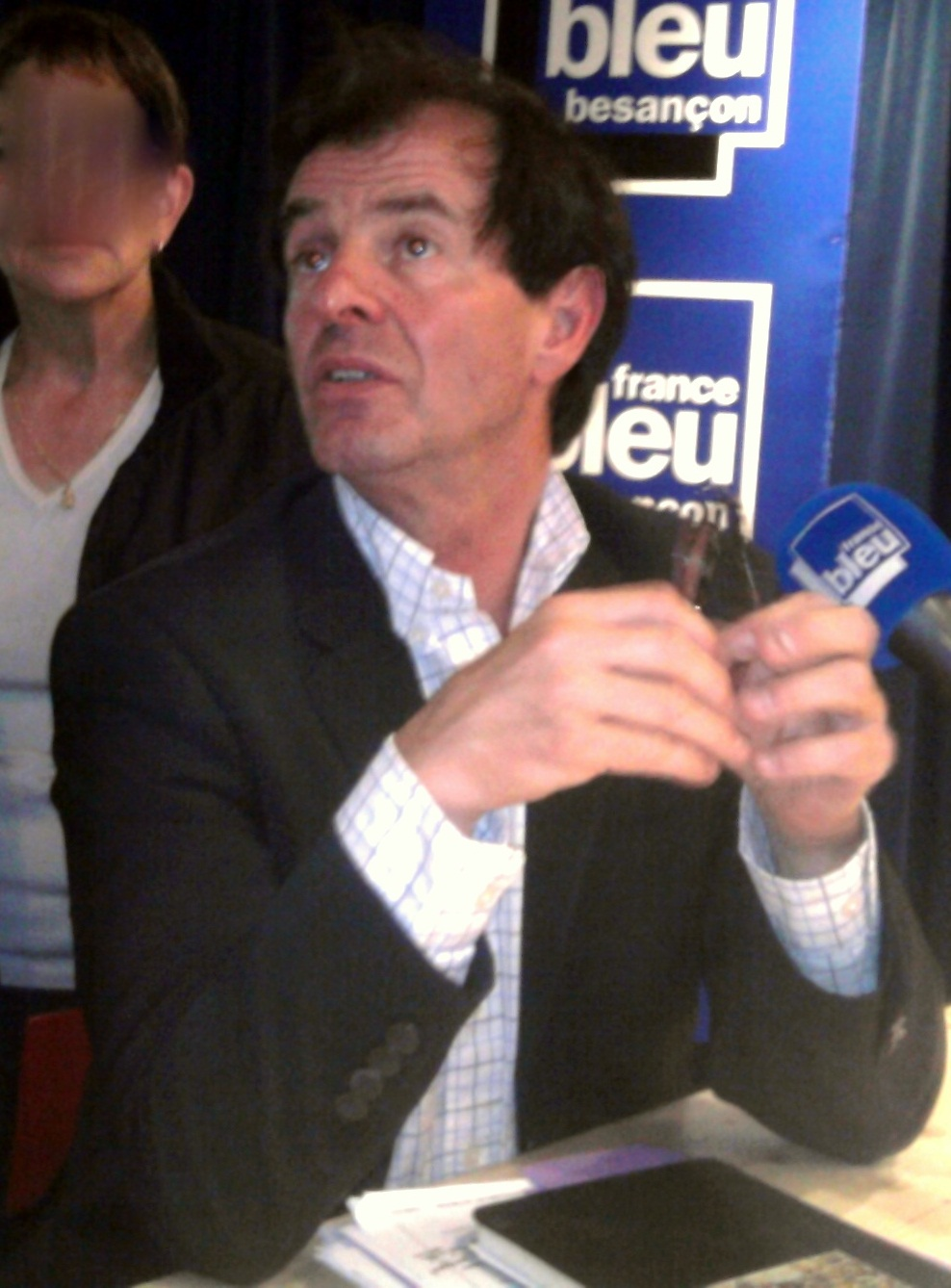 Jacques Grosperrin, député UMP de la deuxième circonscription du Doubs, le 12 juin 2012 lors du débat des législatives Bleu Besançon à Micropolis.